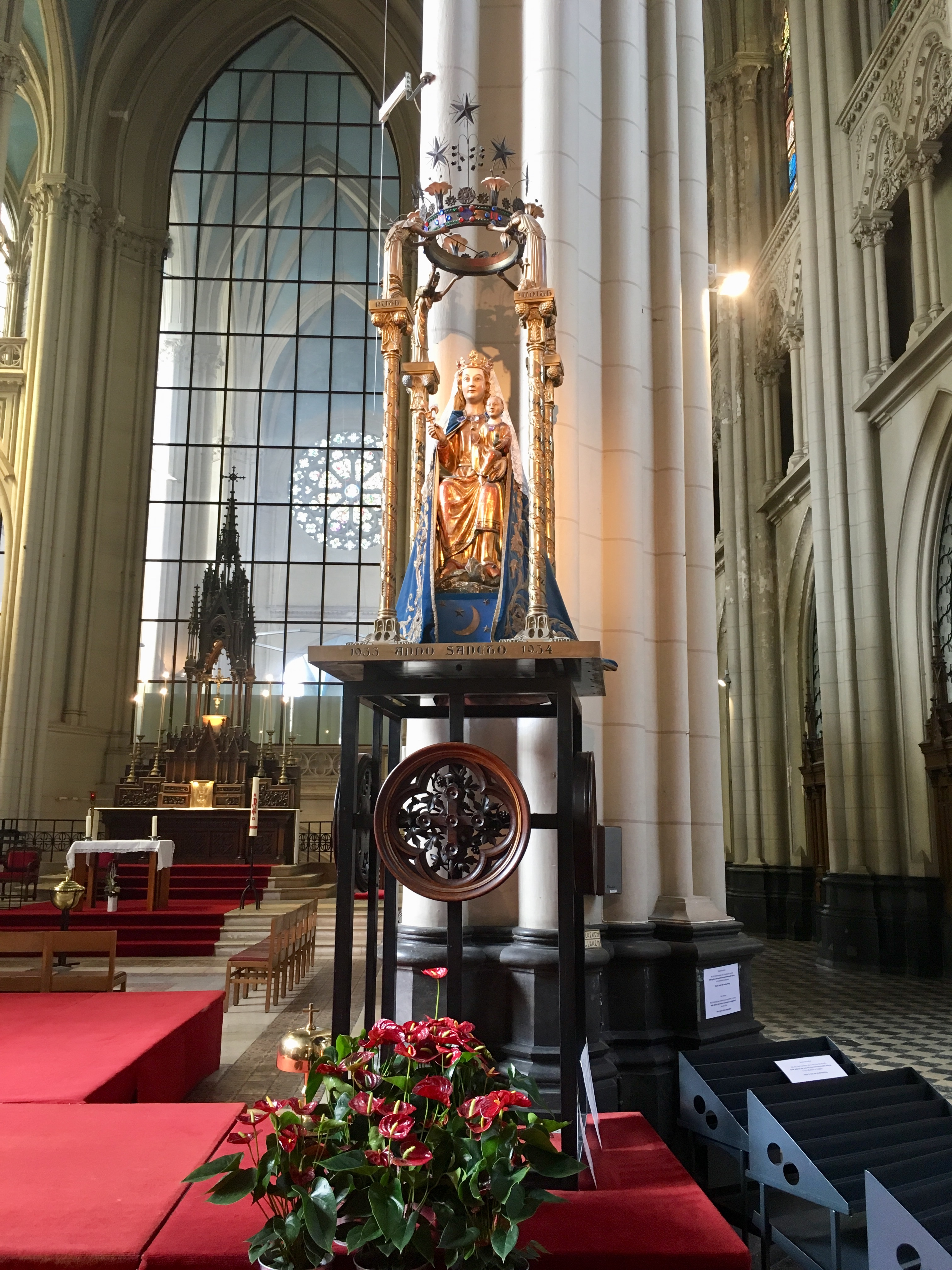 Chiesa di Nostra Signora di Laeken